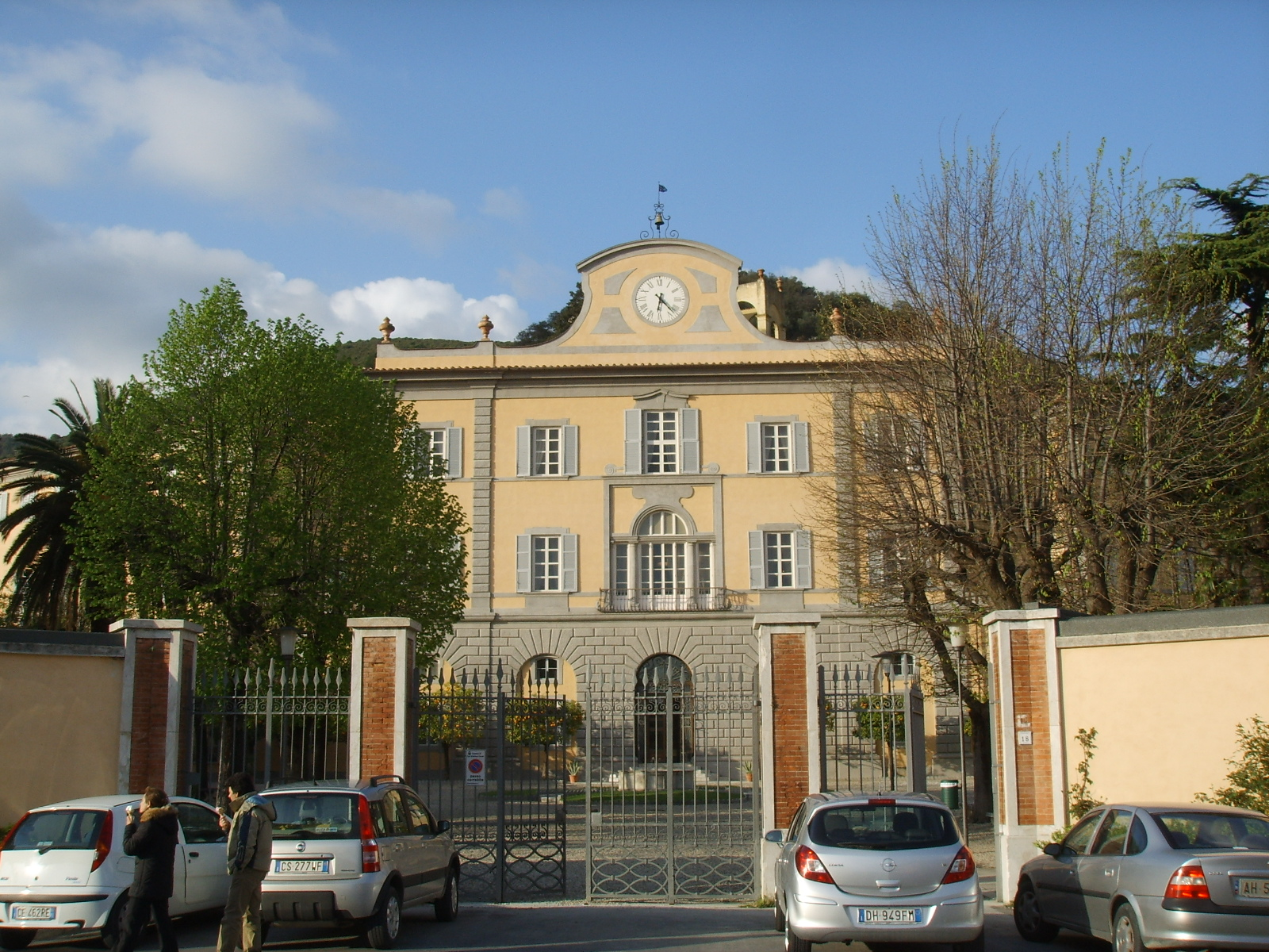 San giuliano terme, centro